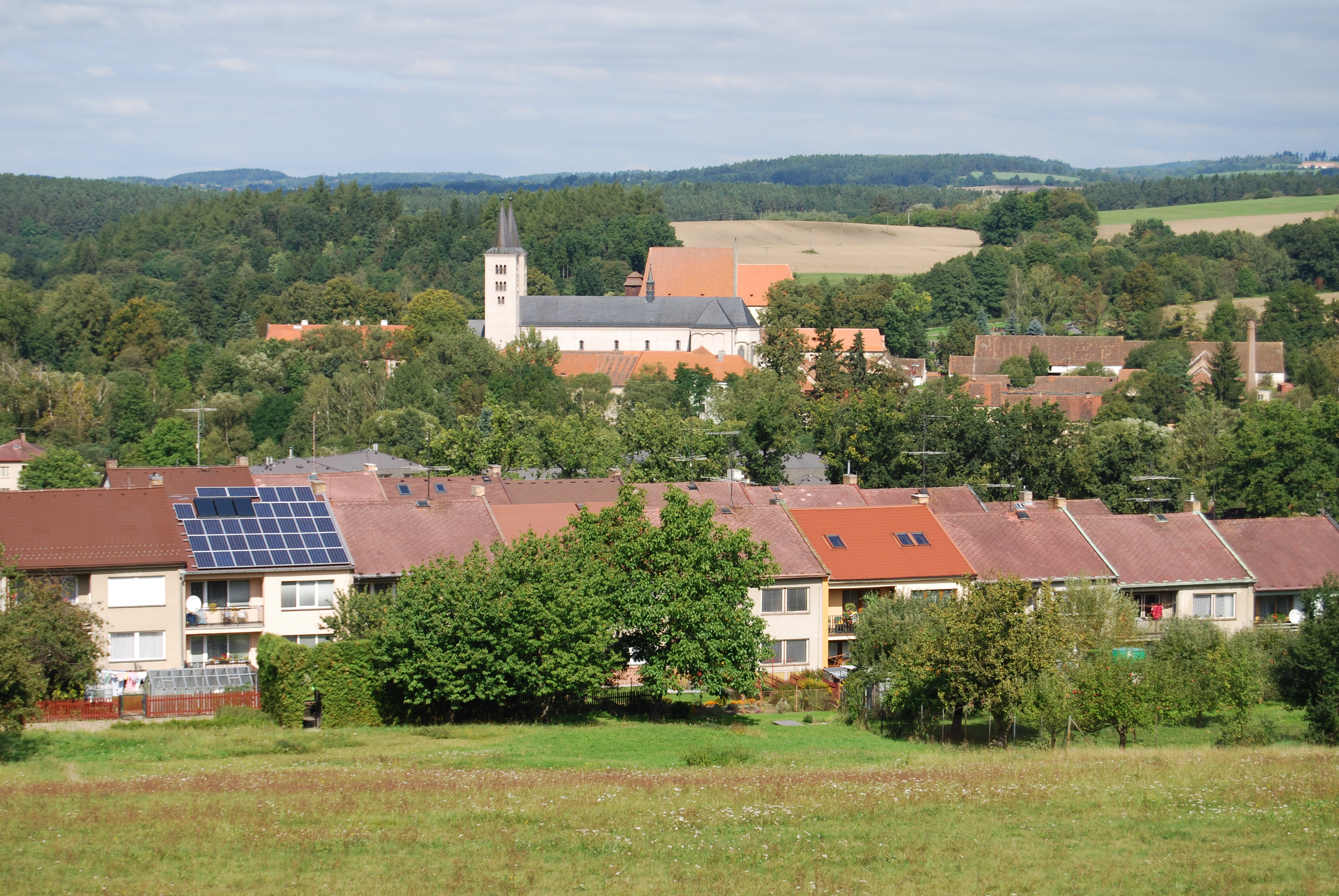 Pohled na Chrám Navštívení Panny Marie a Kostel sv. Jiljí z Hůrek. Milevsko. Okres Písek. Česká republika.